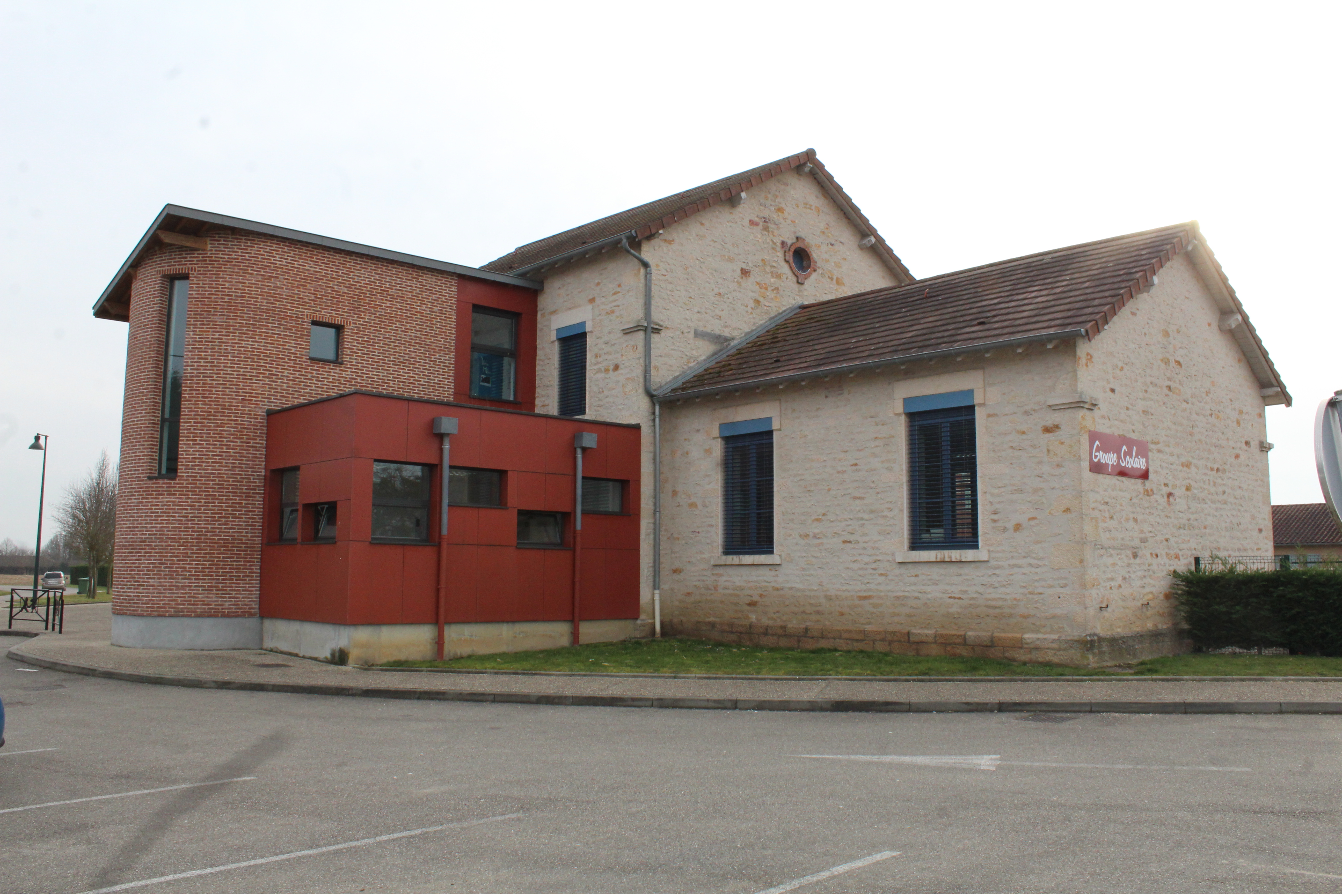 École de Chevroux, dans l'Ain.